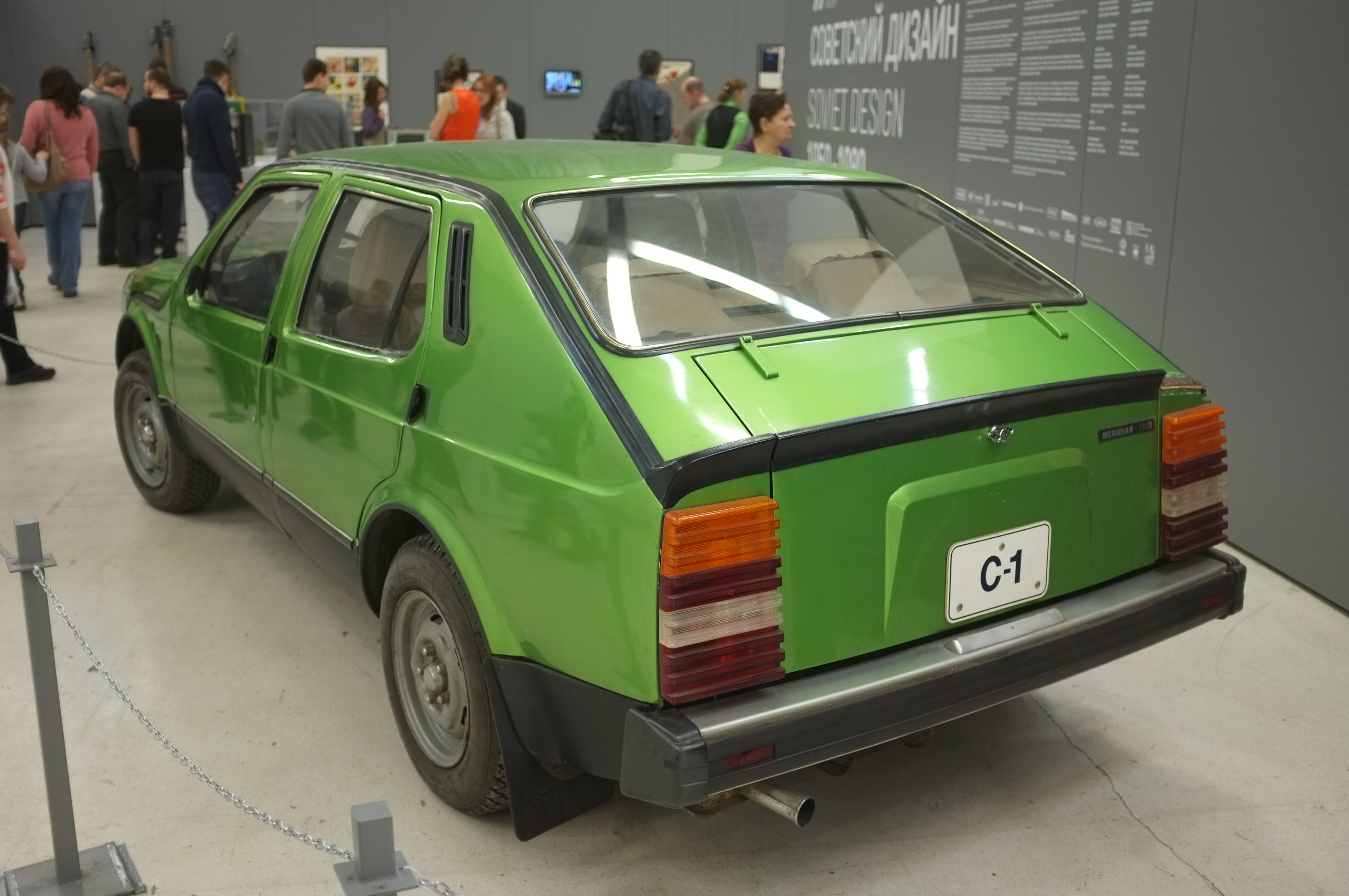 Москвич С-1, не поступивший в серийное производство (1970-ые, СССР)